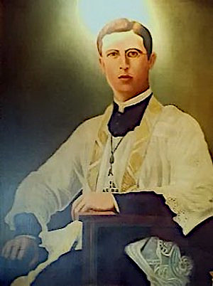 San Jose Maria Robles Hurtado